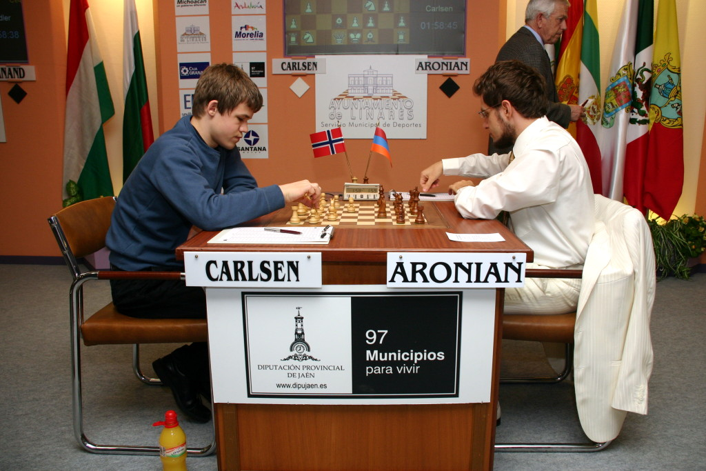 Carlsen (blancas) vs. Aronian (negras)